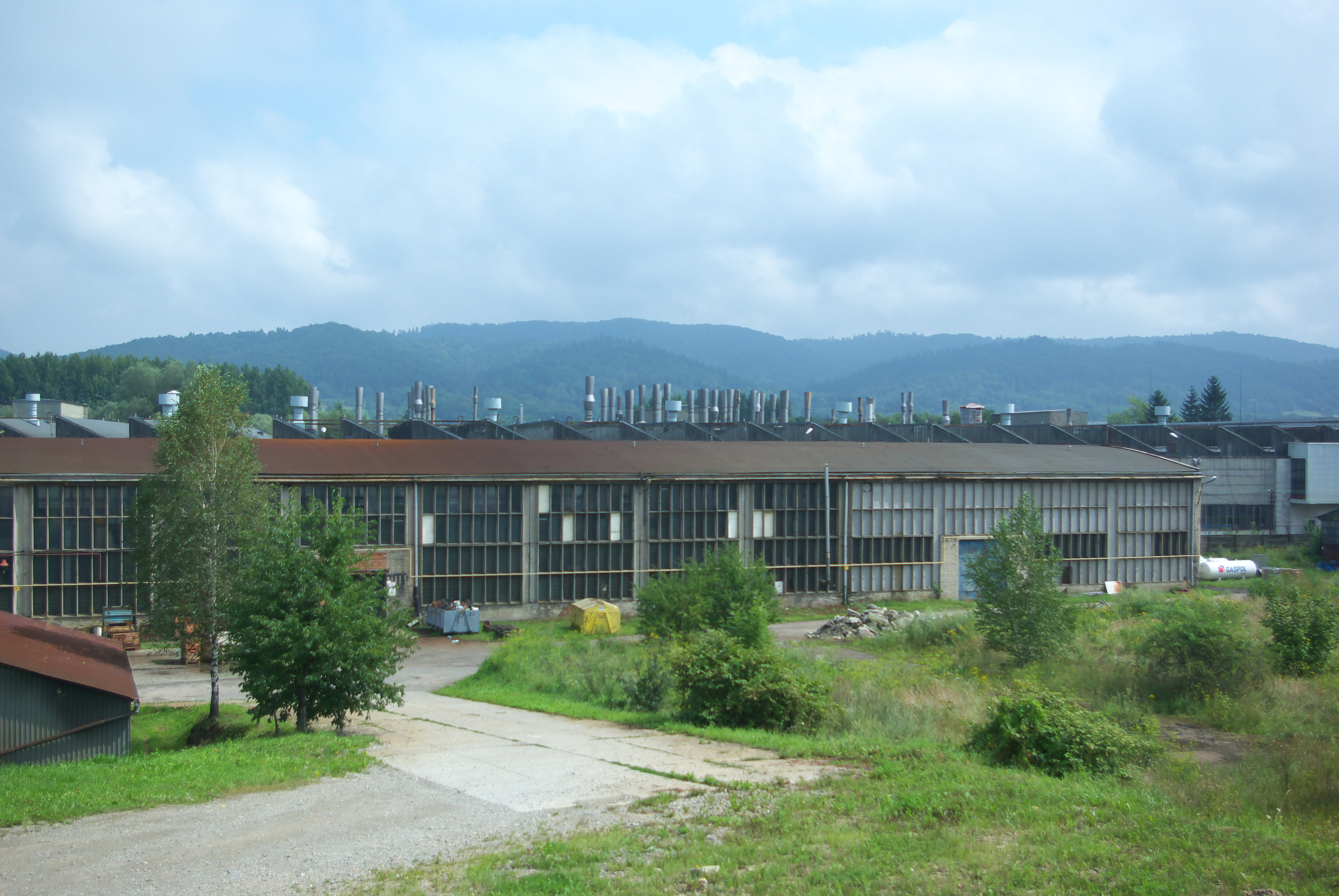 Zabudowania fabryczne Autosanu przy ulicy Stefana Okrzei w Sanoku